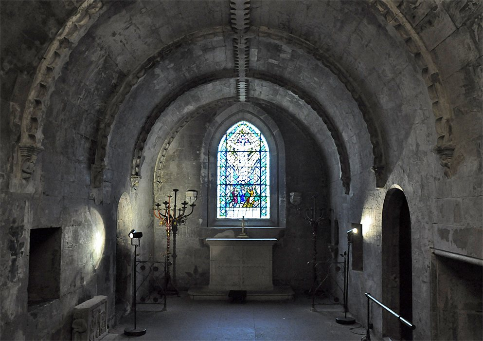 Rosslyn Chapel, Krypta